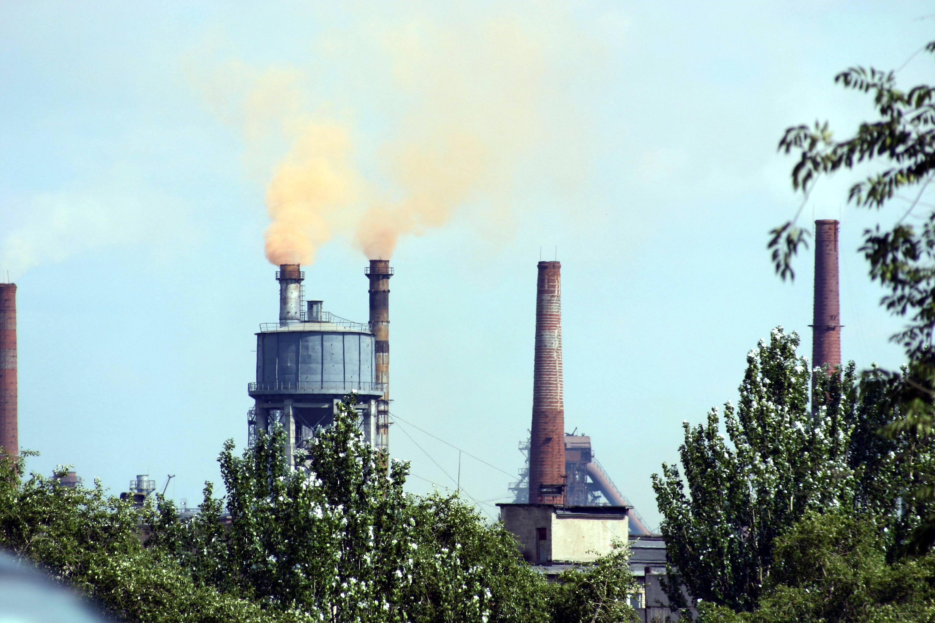 Schwerindustrie prägt das weitere Stadtbild von Donezk (Ukraine)